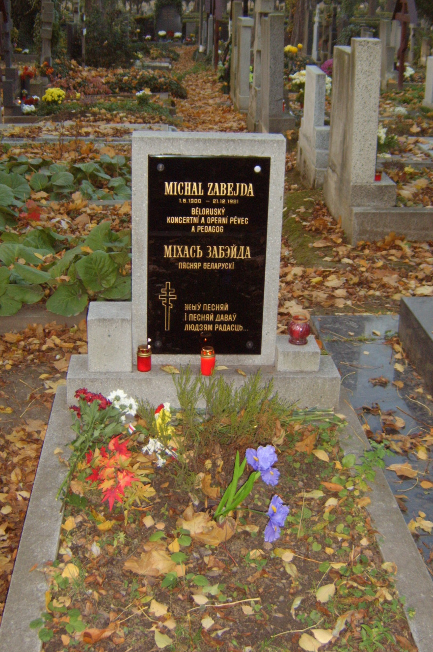 Беларуская (тарашкевіца): Помнік Міхасю Забэйду-Суміцкаму. Альшанскія могілкі, Прага